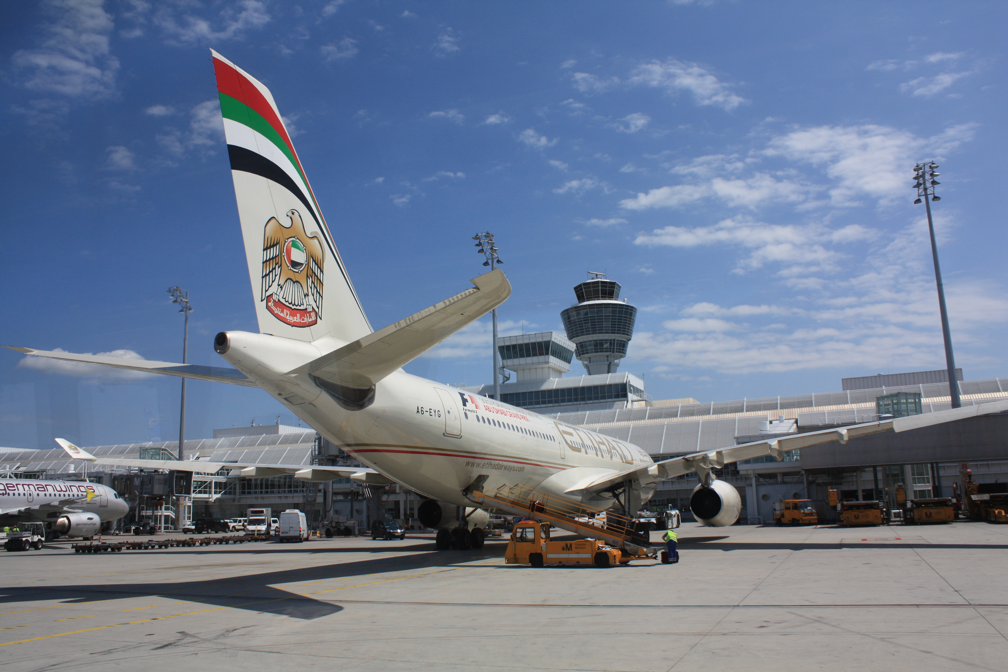 A6-EYG Airbus A330-243 Etihad am Flughafen München